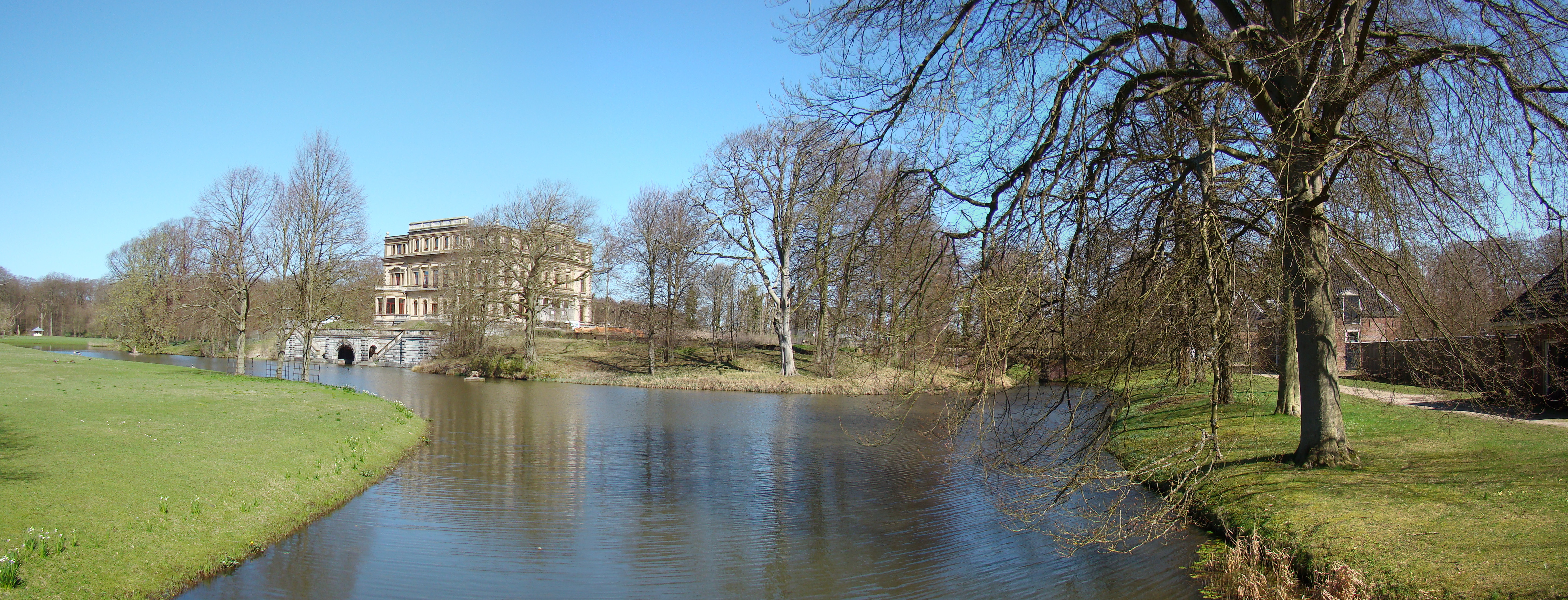 Landgoed Elswout, Overveen